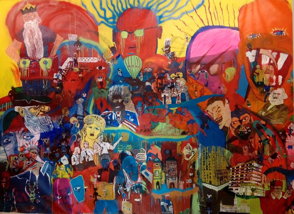 Af sýningunni "By Proxy" í Galerie NEXT, Vínarborg